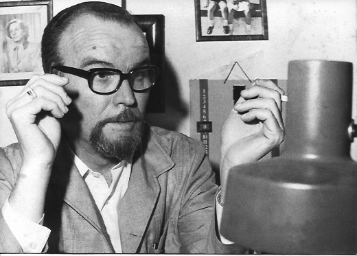 Retrato de Eduardo Millares Sall